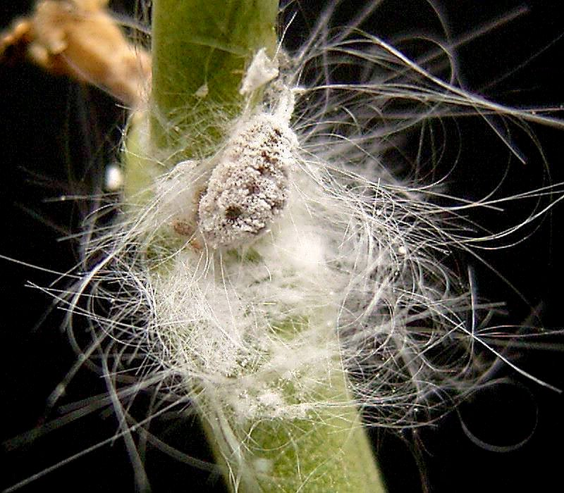 mealy bug / Wolllaus, Schmierlaus